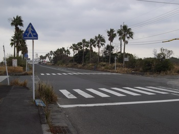 七ツ島産業道路